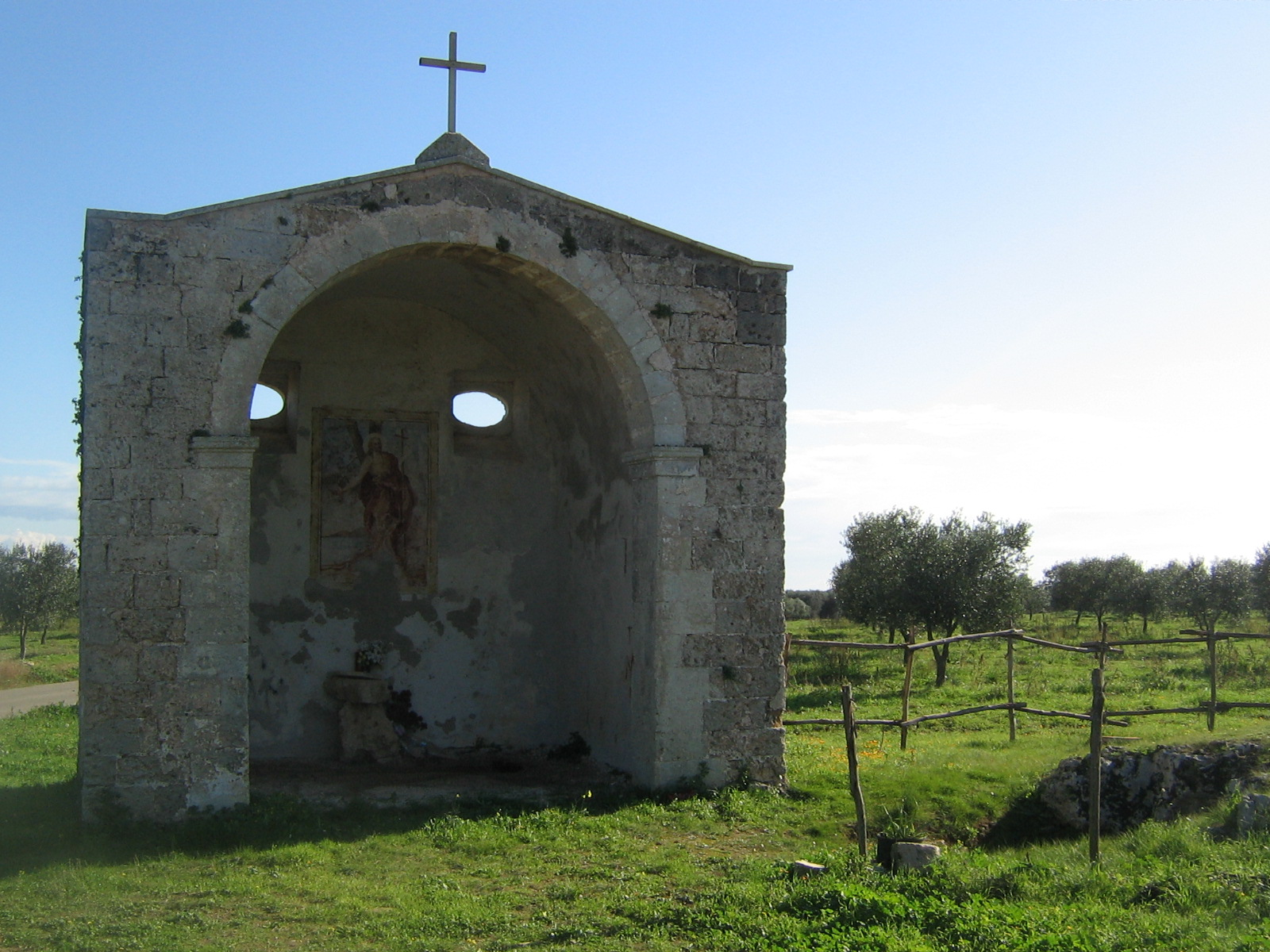 Cutrofiano Chiesa Rupestre di San Giovanni Battista